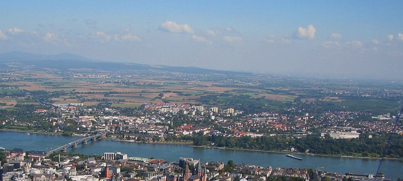 Mainz AKK-Vororte Luftbild Mainz-Kastel Kostheim Rhein Theodor-Heuss-Brücke Foto 2008 Wolfgang Pehlemann Wiesbaden IMG_0075